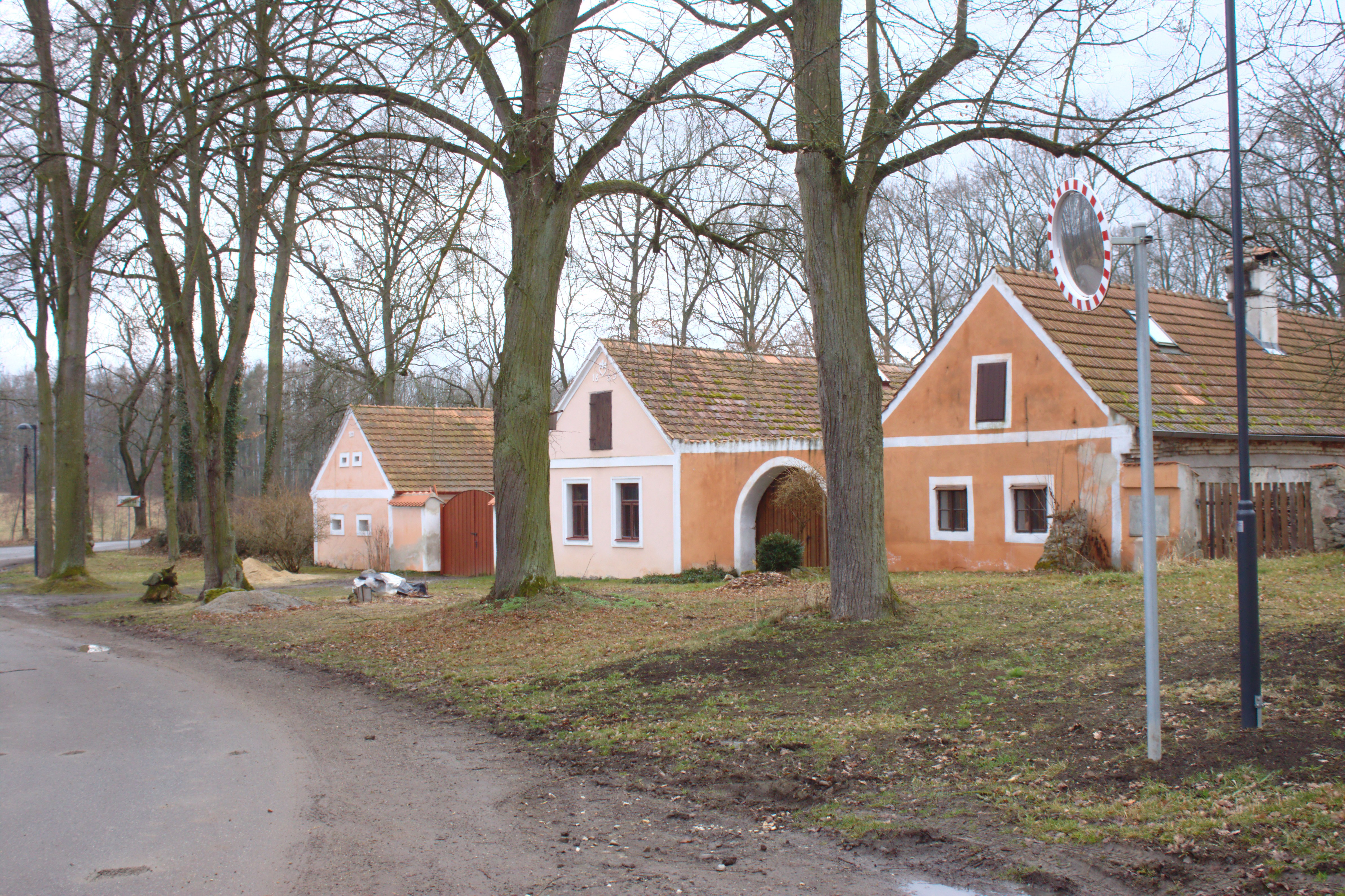 Domky ve vesnici Zveřetice Project: Fotíme Česko